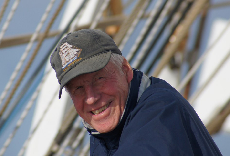 Krzysztog Baranowski na pokładzie STS Chopin, 2011, wykadrowany.